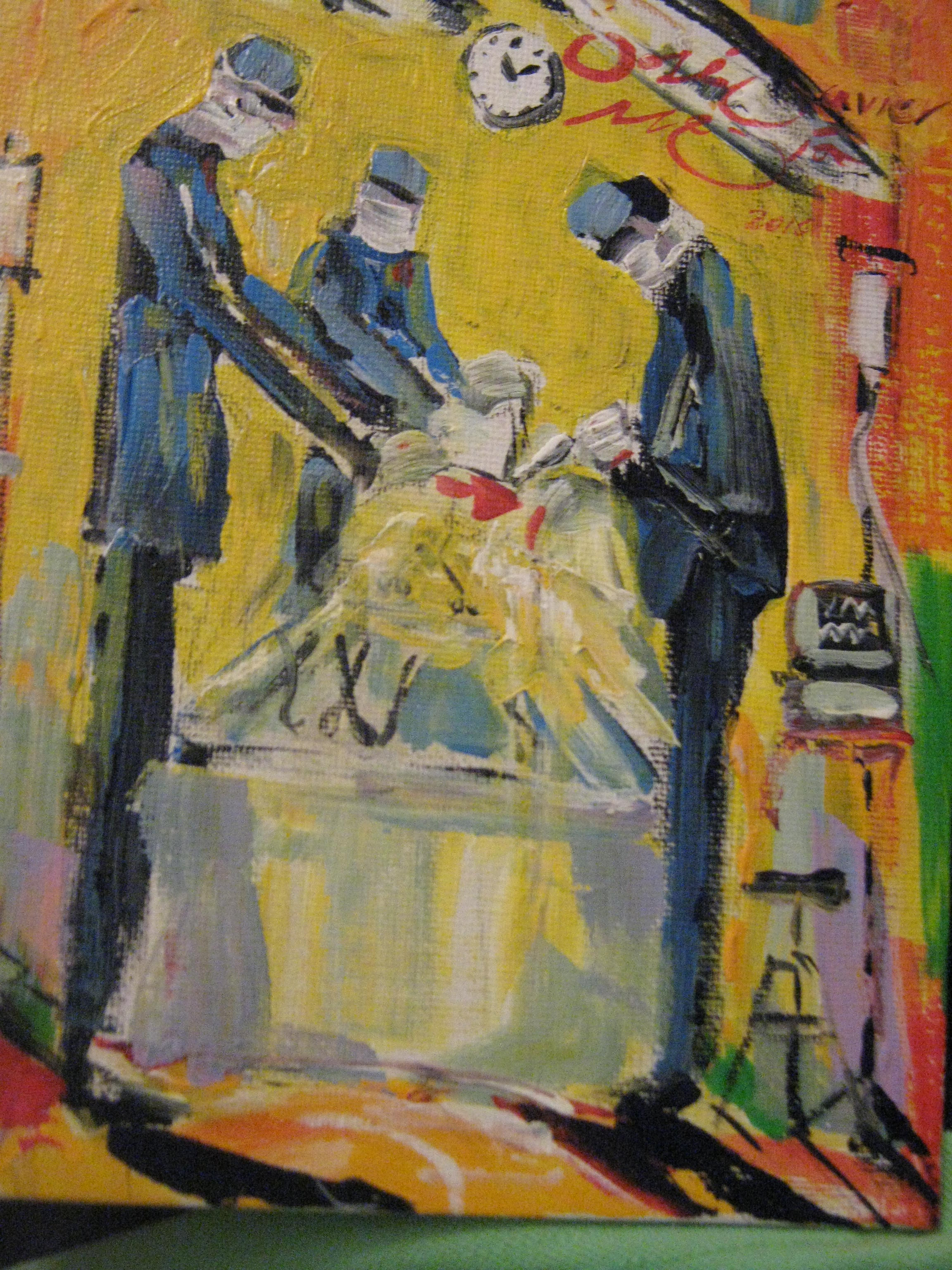 Cirujanos This work has been released into the public domain by its author, yesvari85. This applies worldwide. In some countries this may not be legally possible; if so: yesvari85 grants anyone the right to use this work for any purpose, without any conditions, unless such conditions are required by law.